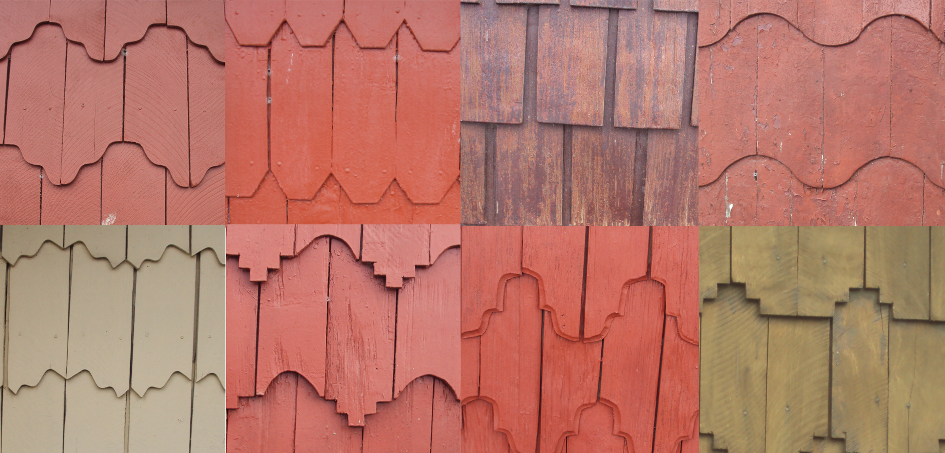 Distintos modelos de tejuelas chilotas de madera